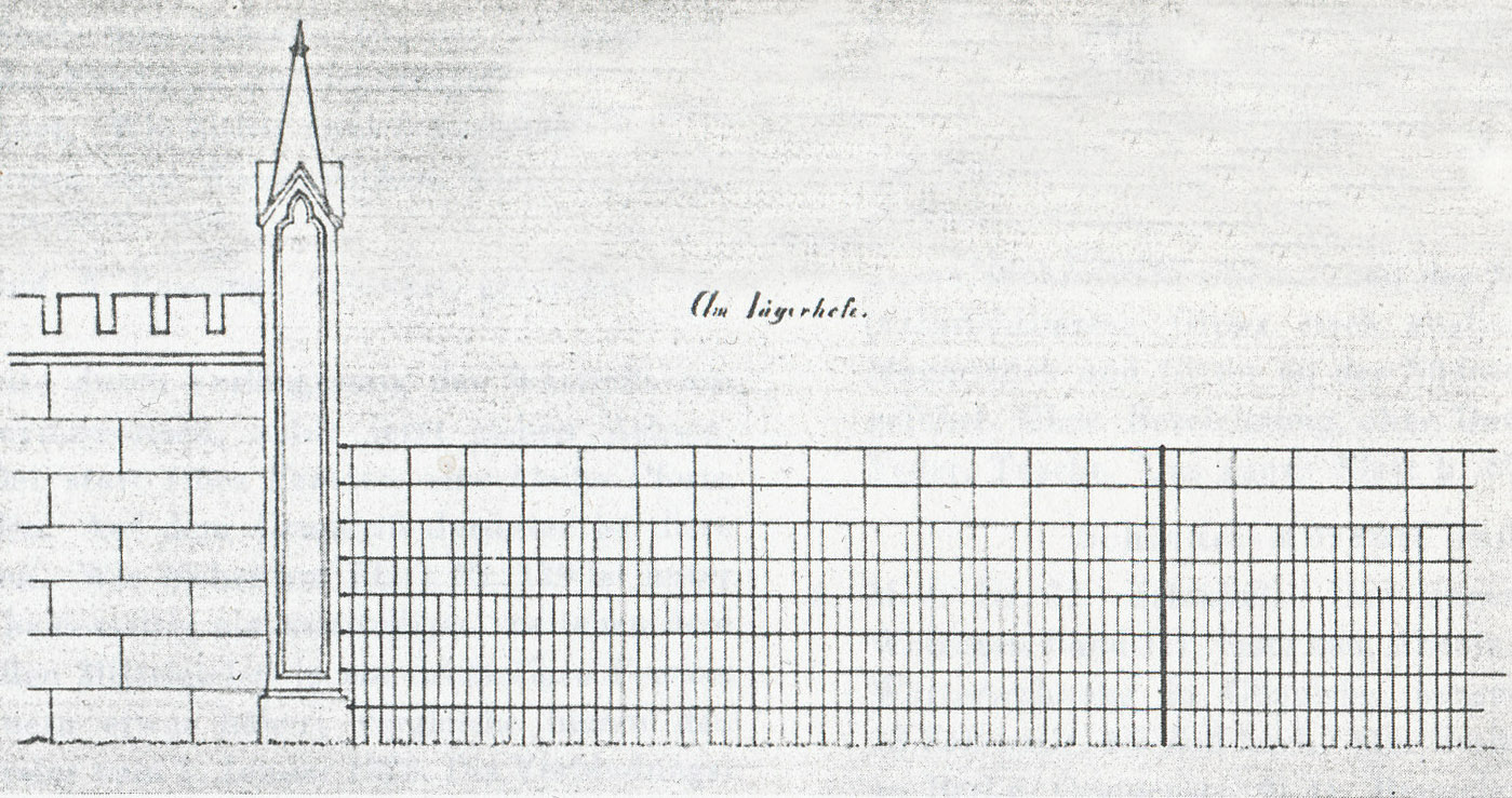 Invisible Fence am Jägerhof, Entwurf von Schinkel